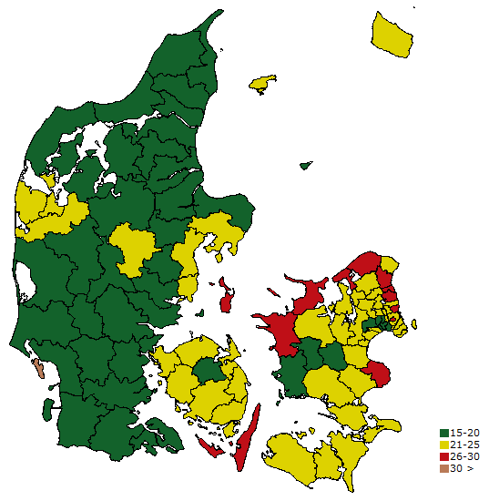 Druk fordelt på danske kommuner (for mænd).